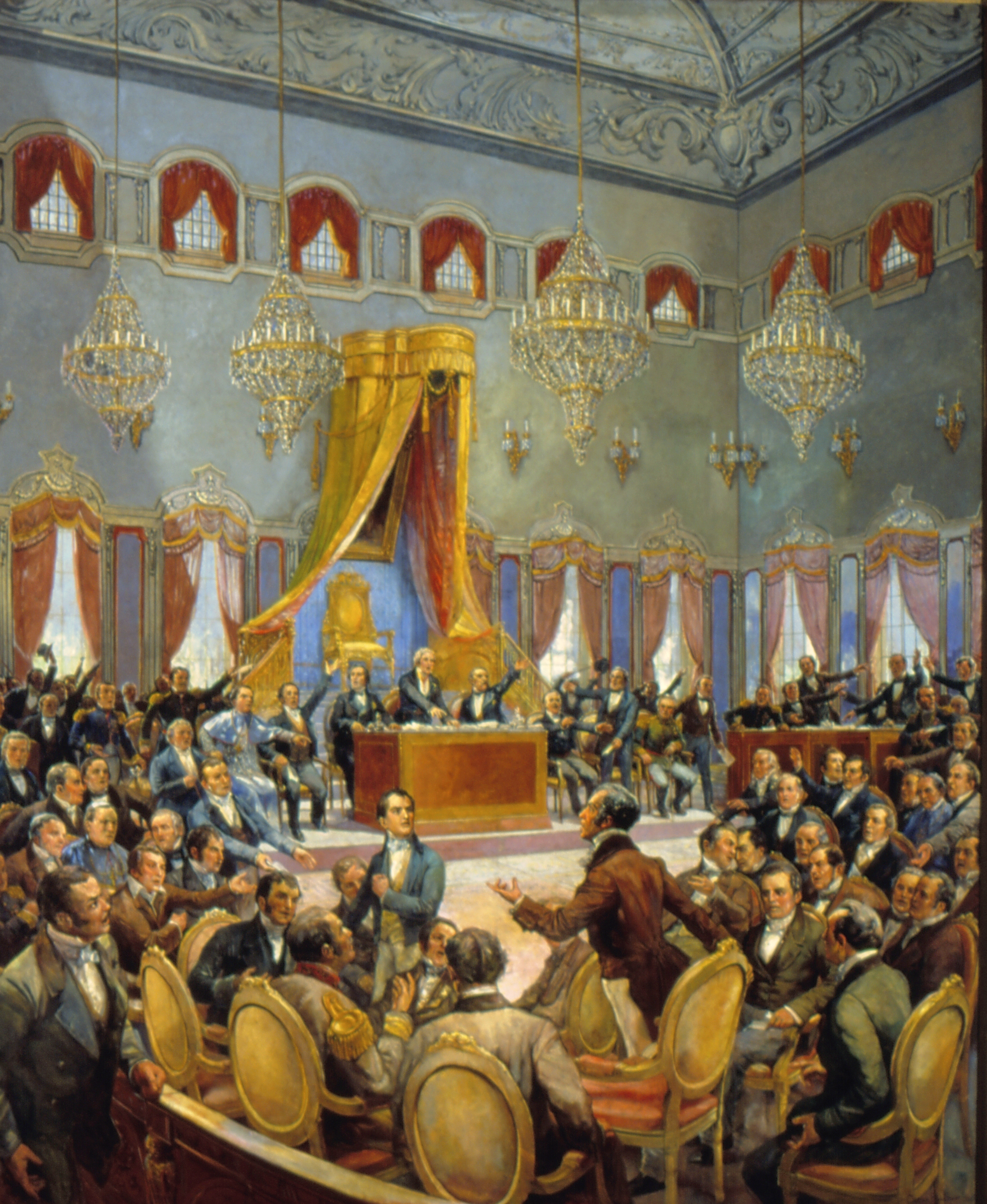 Obra que integra o acervo do Museu Paulista da USP. Coleção Fundo Museu Paulista - FMP